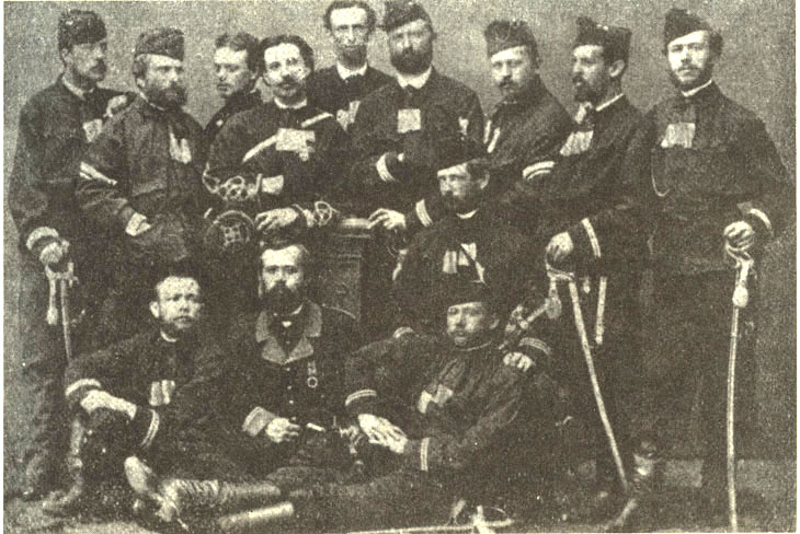 Voluntarios austriacos, 1866.